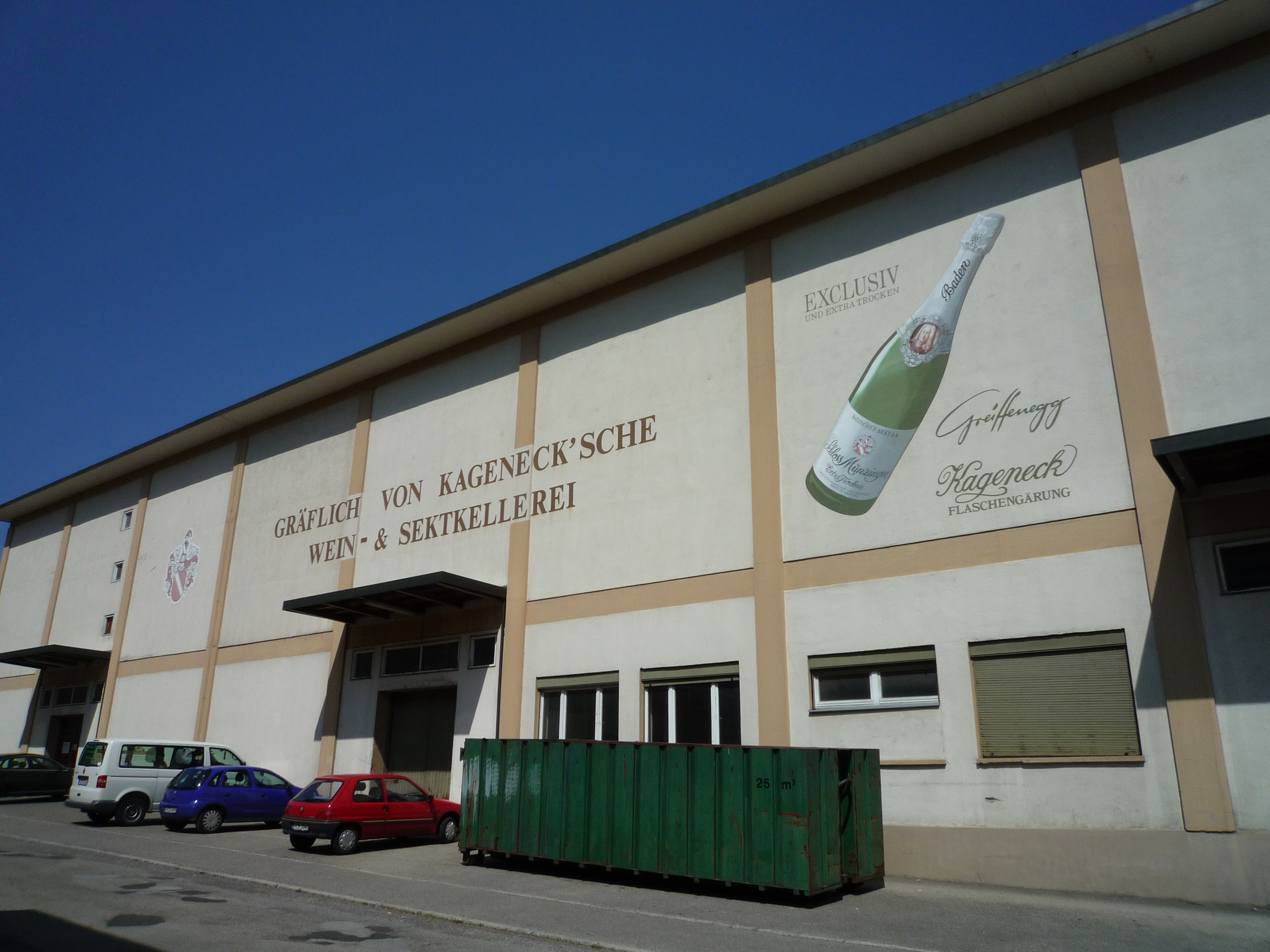 Gräflich von Kageneck'sche Wein- und Sektkellerei in Breisach